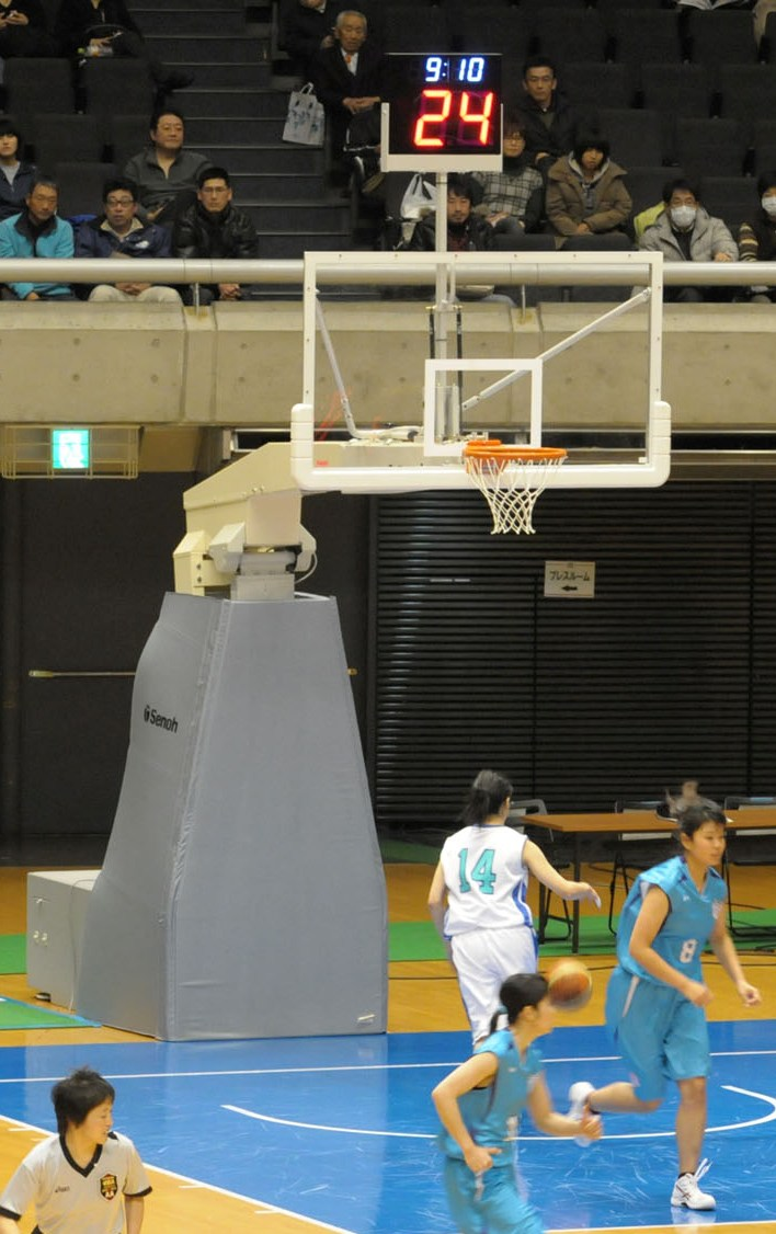 2012年全日本総合バスケットボール選手権大会2回戦、環太平洋大学対筑波大学。東京体育館で。